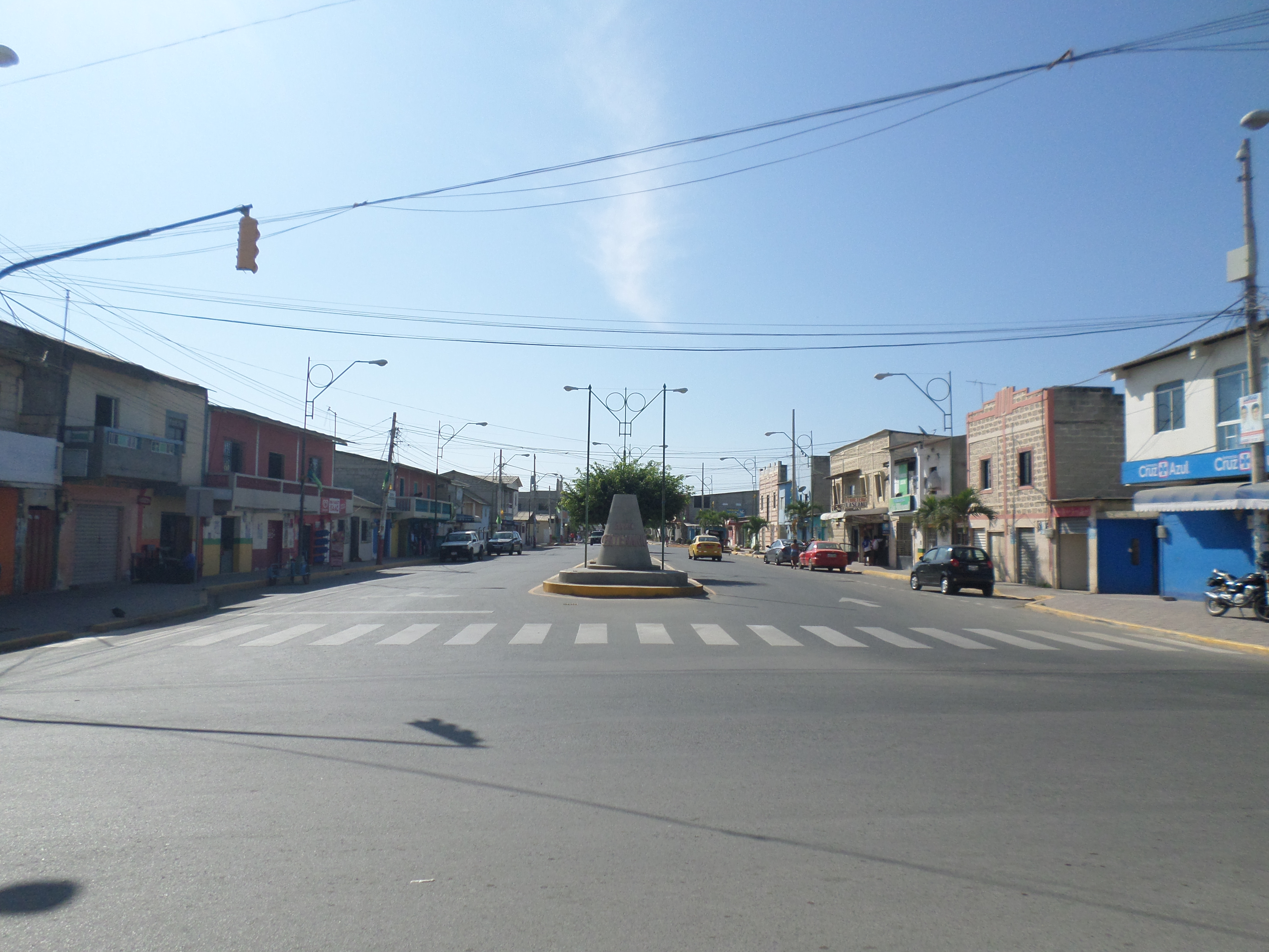 Vista del Barrio Centenario, en Ciudadela.